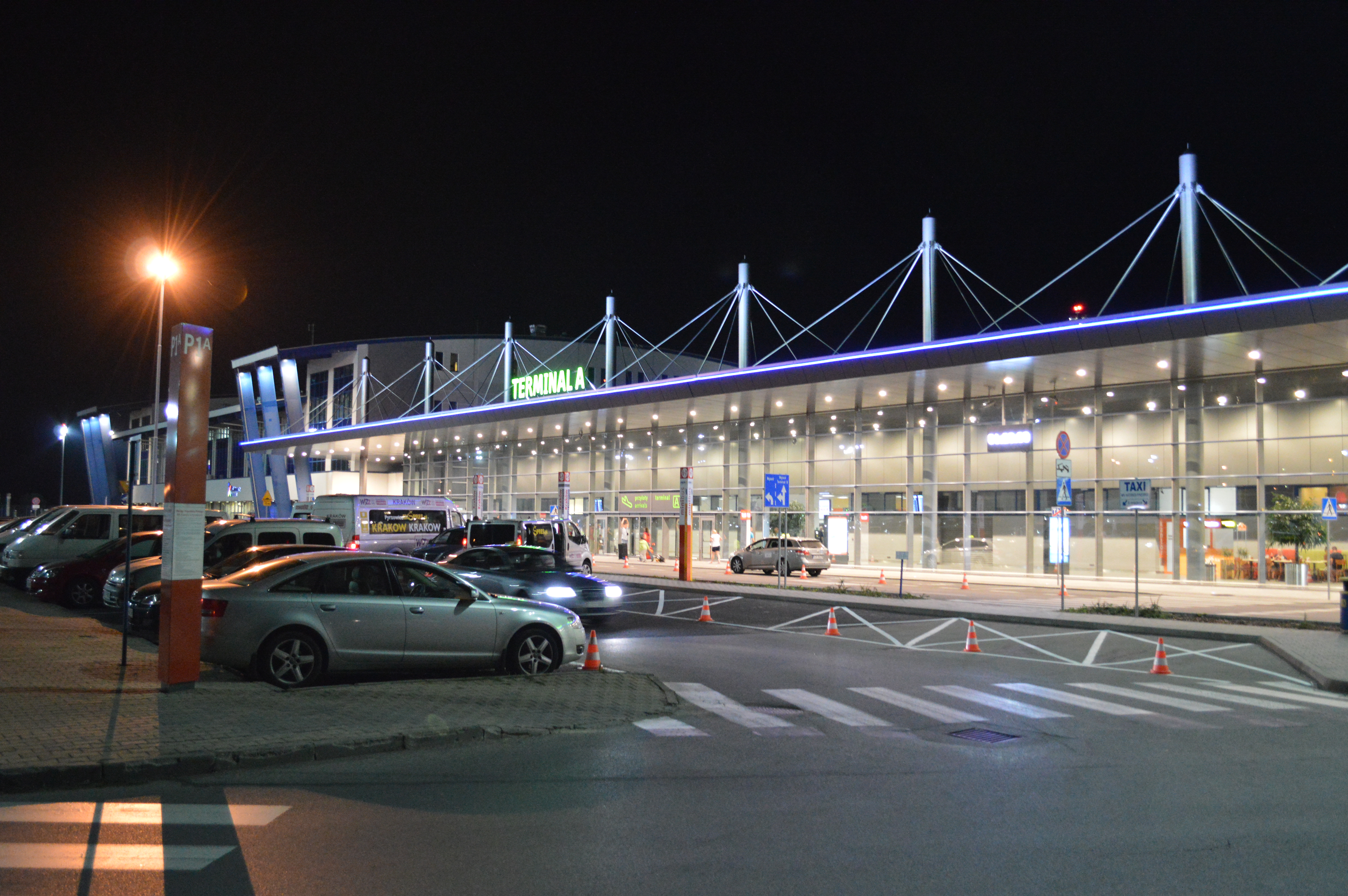 Katowice Airport nocą